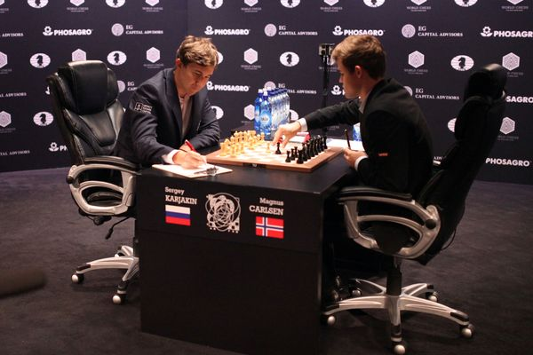 Карлсен - Карякин, 4 партия